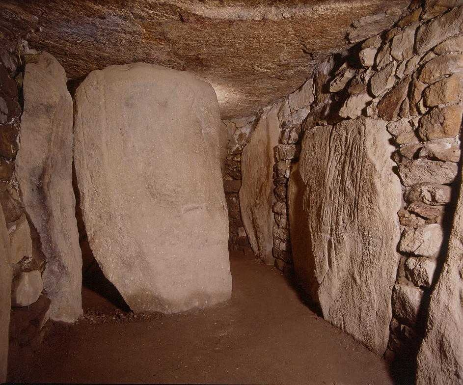 Les pierres plates Jean-Charles GUILLO